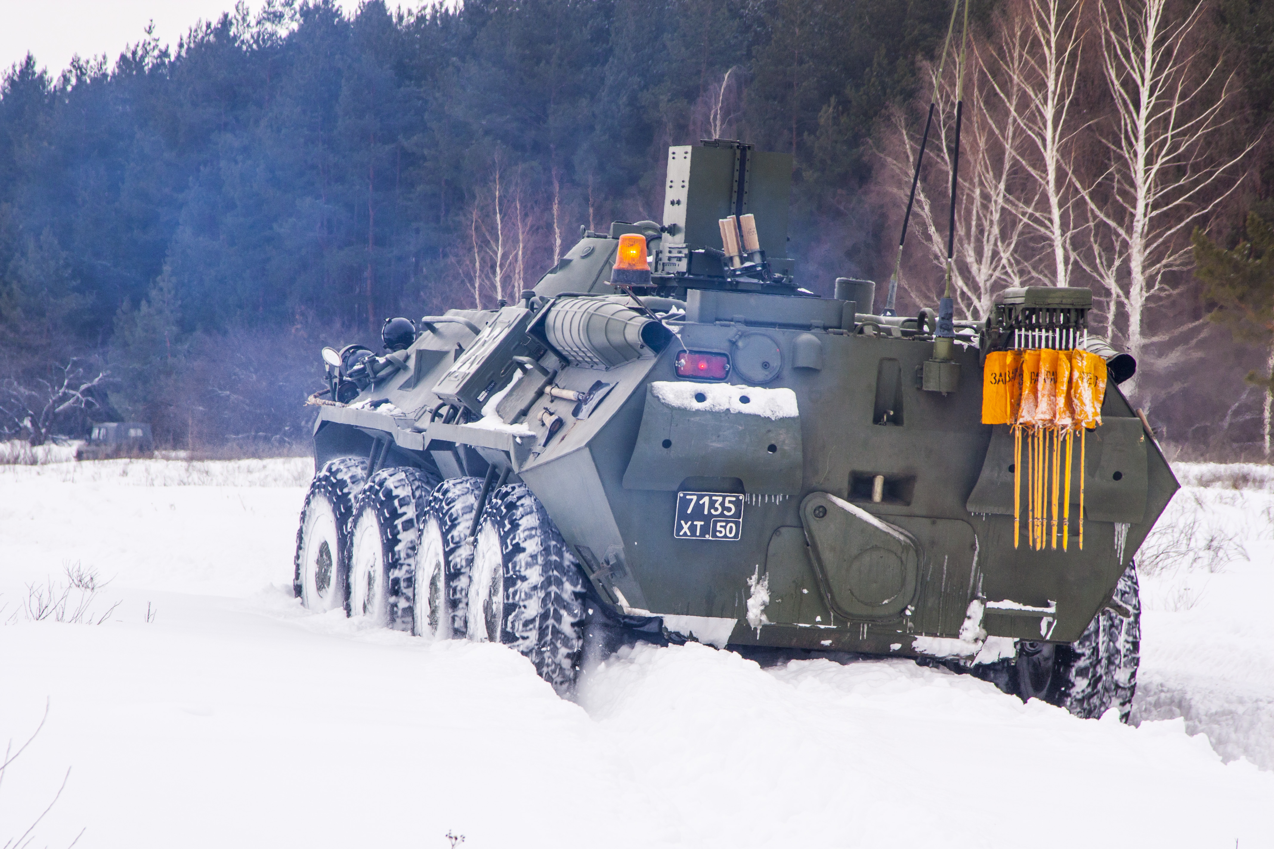 РХМ-6. Учение с 27-й отдельной бригады РХБЗ по ликвидации последствий условного химического заражения в Курской области.